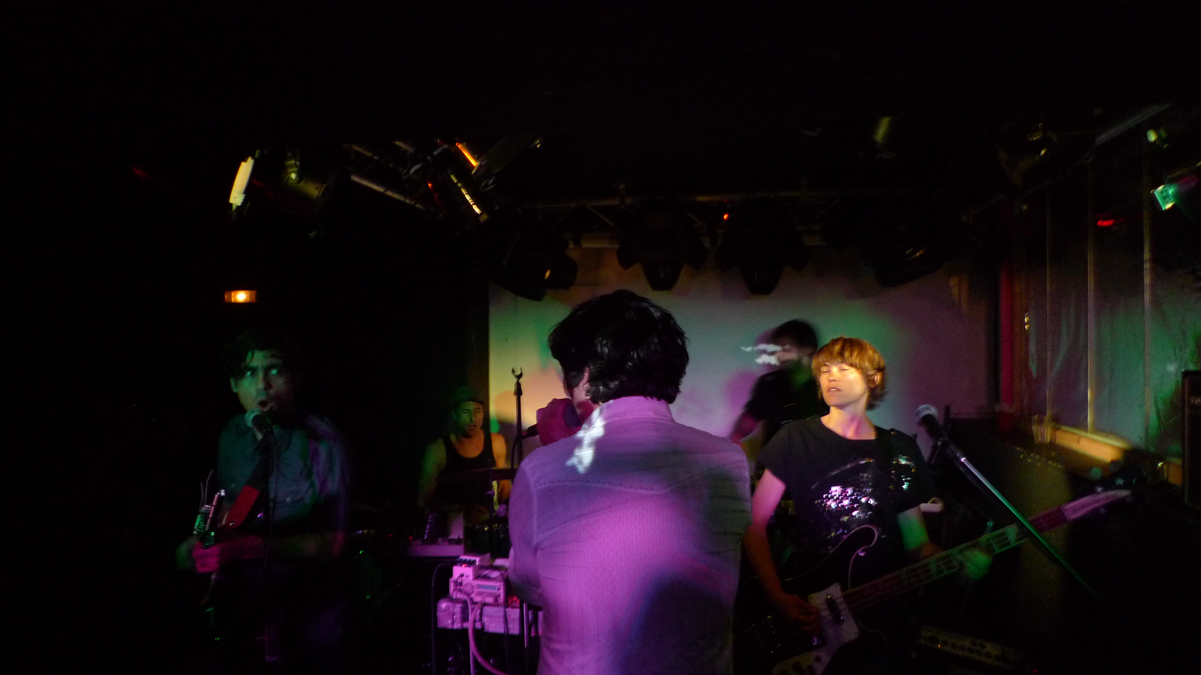 Banda chilena Pánico en concierto